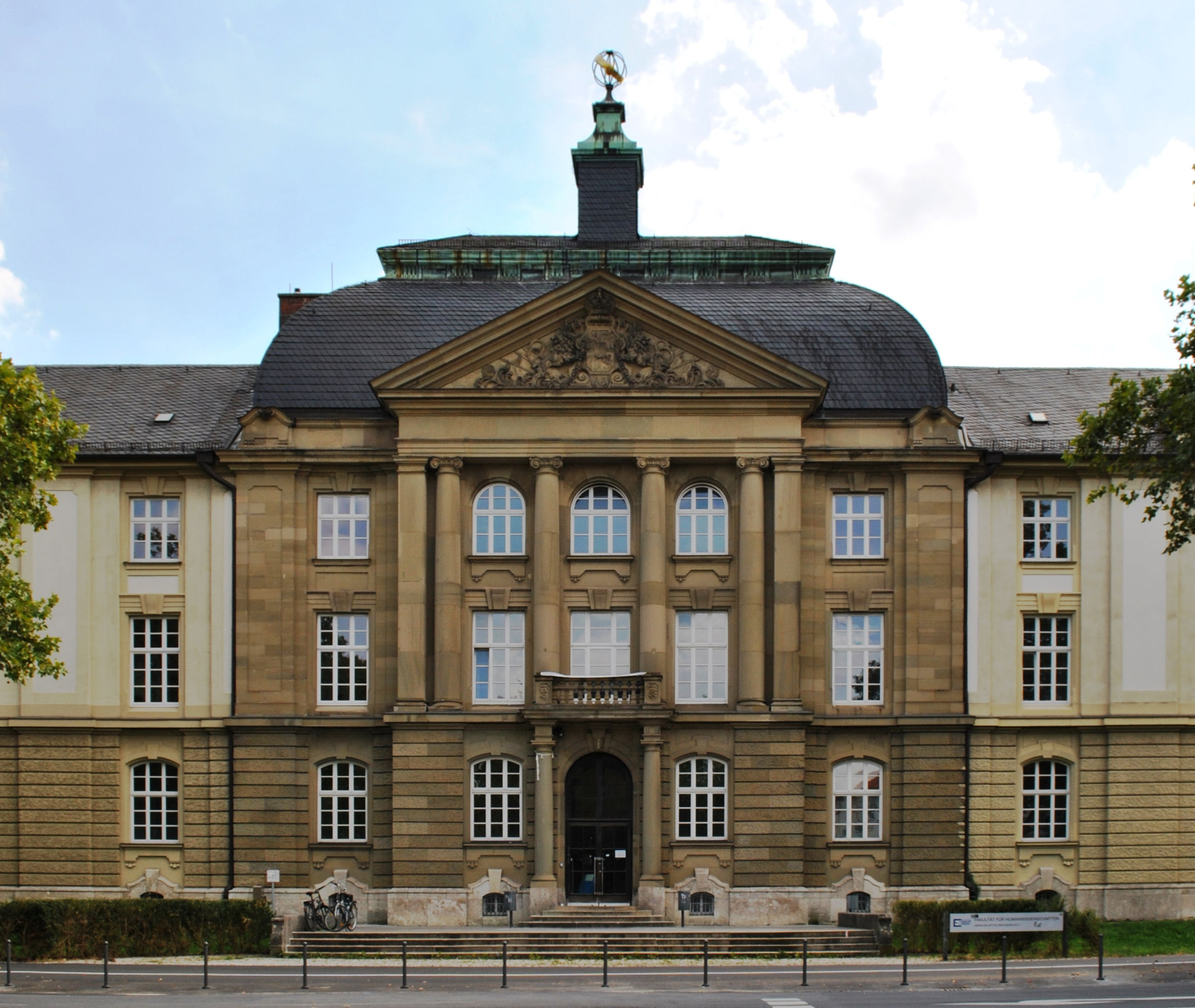 Pädagogische Hochschule der Universität Schlossähnlicher dreigeschossiger Dreiflügelbau, die langgestreckte Front mit Satteldach, Mittel- und Eckpavillons mit Mansardwalmdächern, Putzfassade mit Sandsteingliederungen, im Mittelpavillon mit angedeutetem Säulenportikus und Tympanon-Relief, Neubarock, 1894–98This is a photograph of an architectural monument.